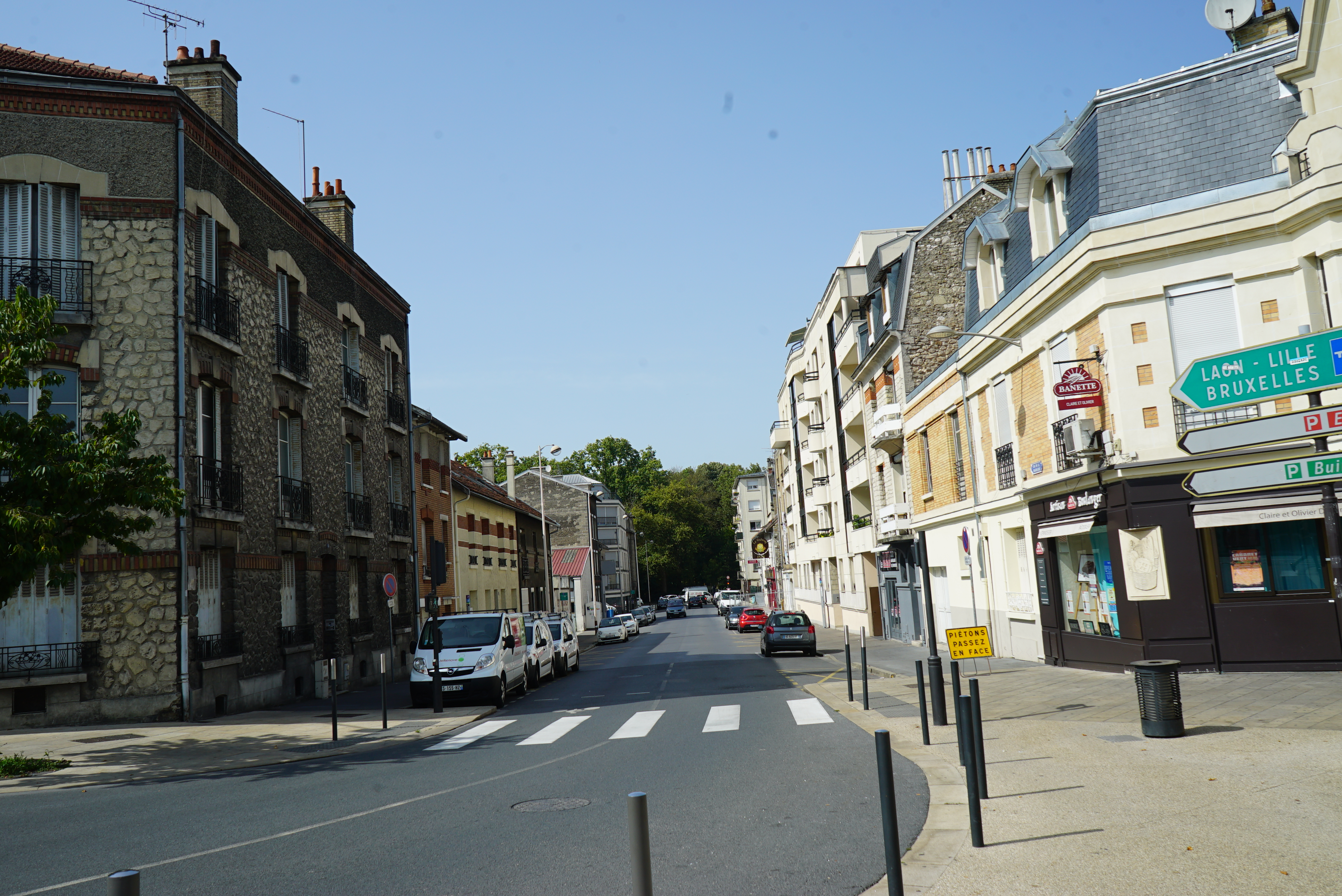 vue de la rue depuis la place stalingrad vers le Jard̈.